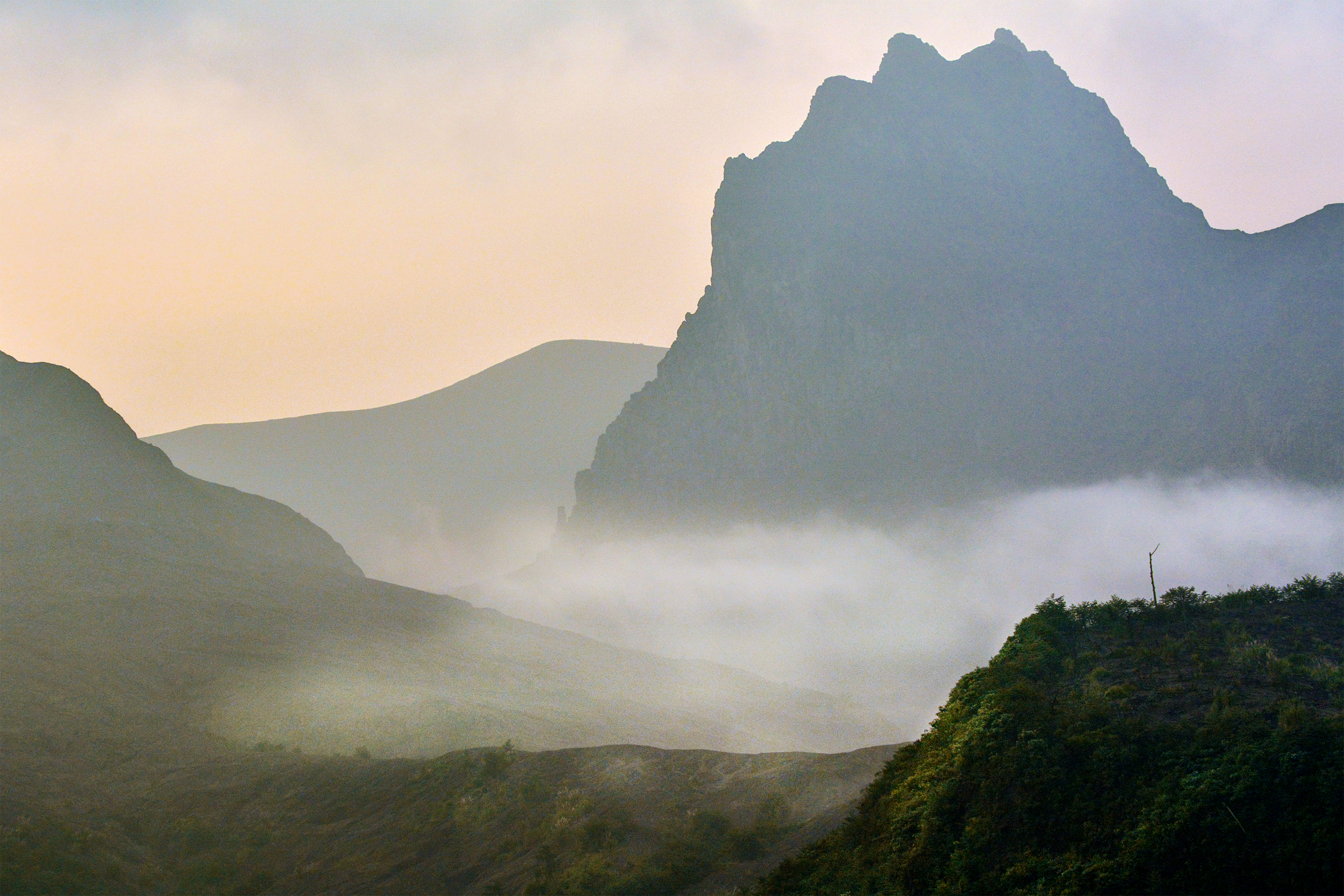 Gunung Kelud merupakan salah satu gunung teraktif di Indonesia. Terletak di perbatasan Kabupaten Kediri, Blitar, dan Malang, sehingga menimbulkan konflik penguasaan wilayah antara Kediri dan Blitar. Aktivitas wisata ke G. Kelud banyak dilakukan melalui jalur Kediri, karena infrastruktur jalan yang lebih nyaman dan mudah dijangkau. Puncak Sumbing merupakan salah satu daya tarik wisata ke G. Kelud. Tebing yang hampir tegak dengan struktur batuan beku memikat wisatawan untuk mendatangi tempat ini.